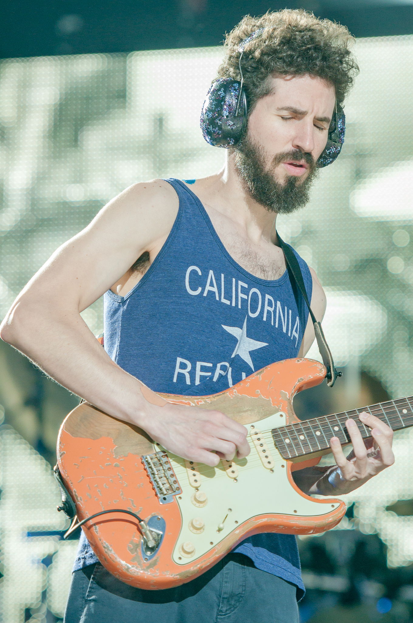 ARGO-Konzerte,Brad Delson,Centerstage,Konzert,Linkin Park,Livekonzert,Livemusik,Musik,RiP,Rock im Park 2014